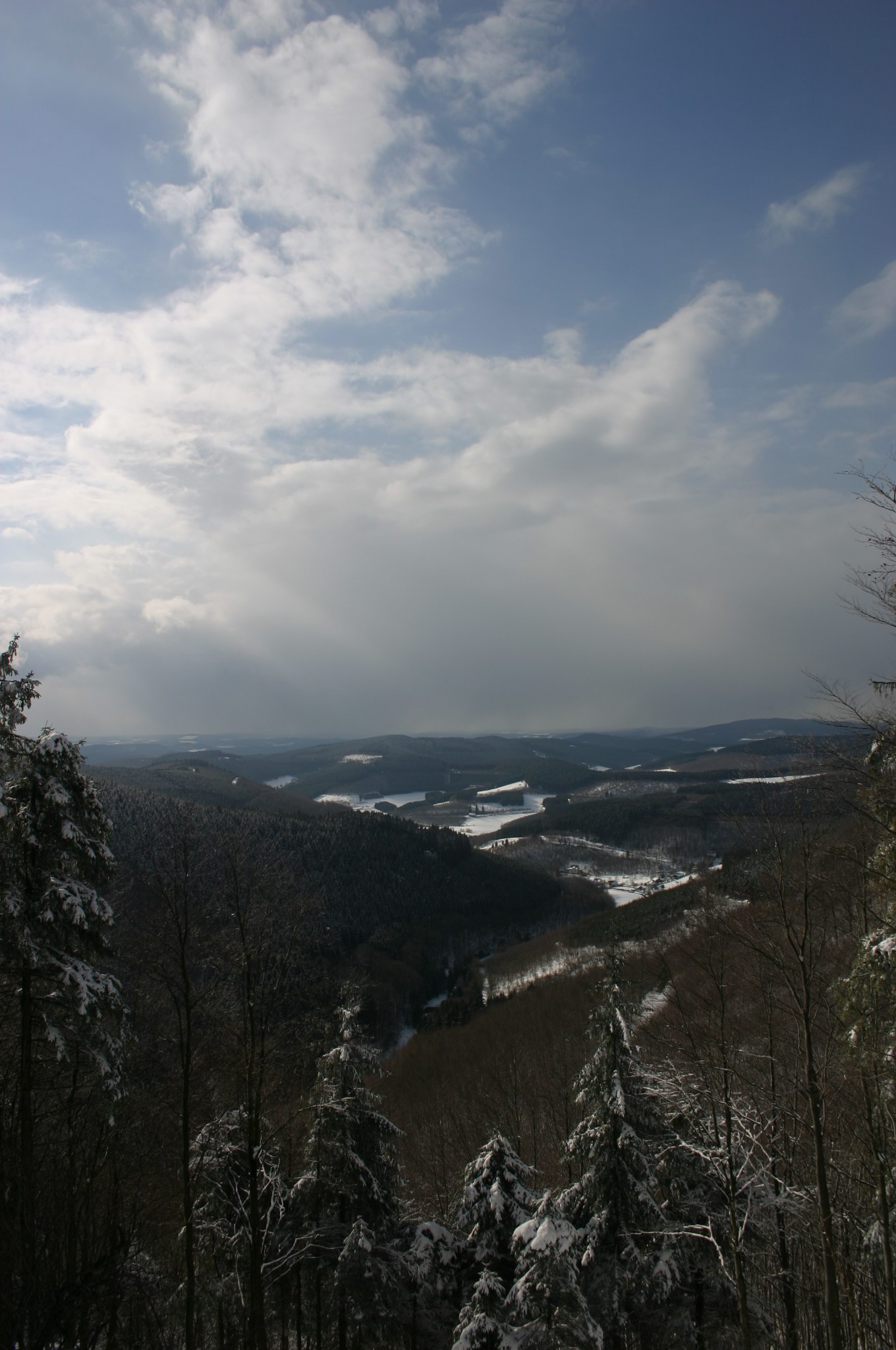 Eisenstraße in Höhe der Schönen Aussicht. Blick über das Siegerland nach Westen